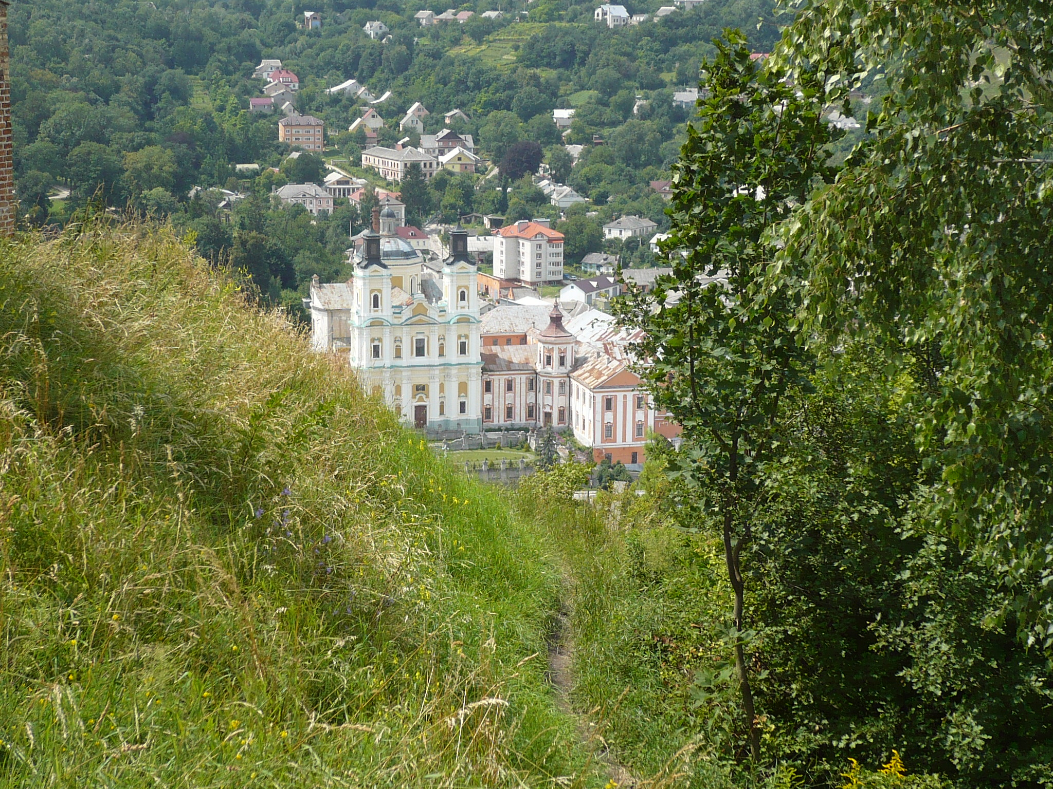 Liceum w Krzemieńcu